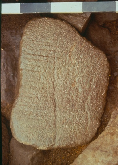 Macina rinvenuta ad Scqua Fredda al Passo di Redebus (TN)